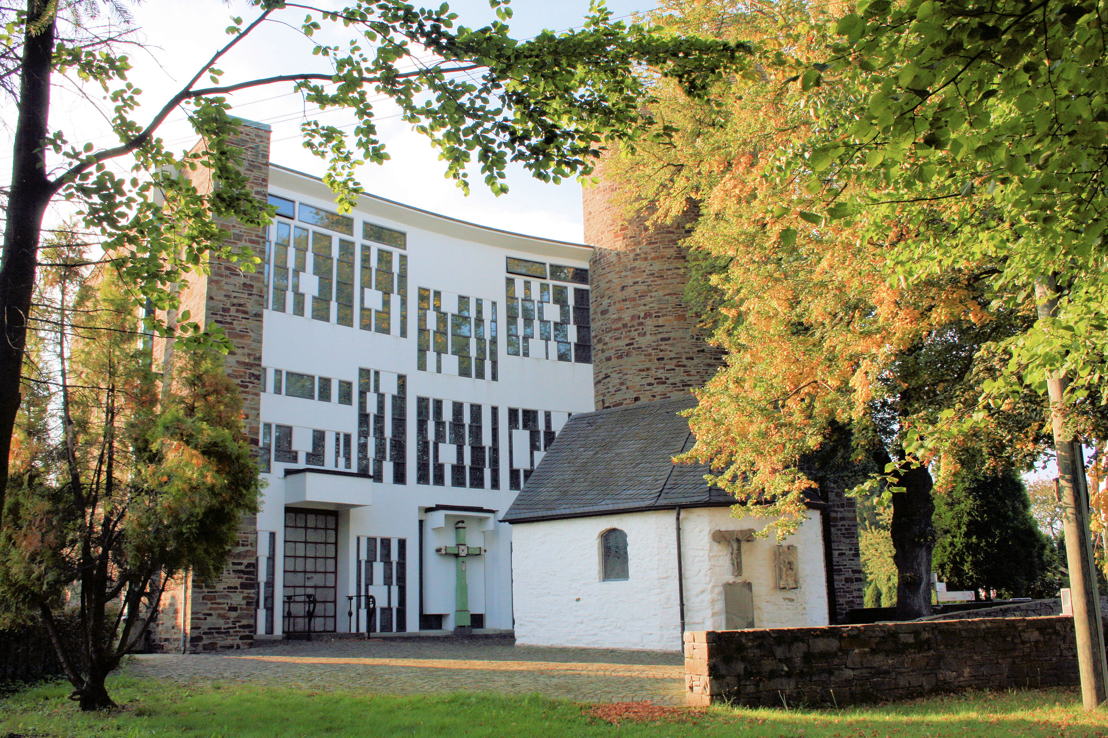 Heilig-Kreuz-Kirche mit Kirchhof und Marienkapelle, Süchterscheid, Hennef (Sieg)